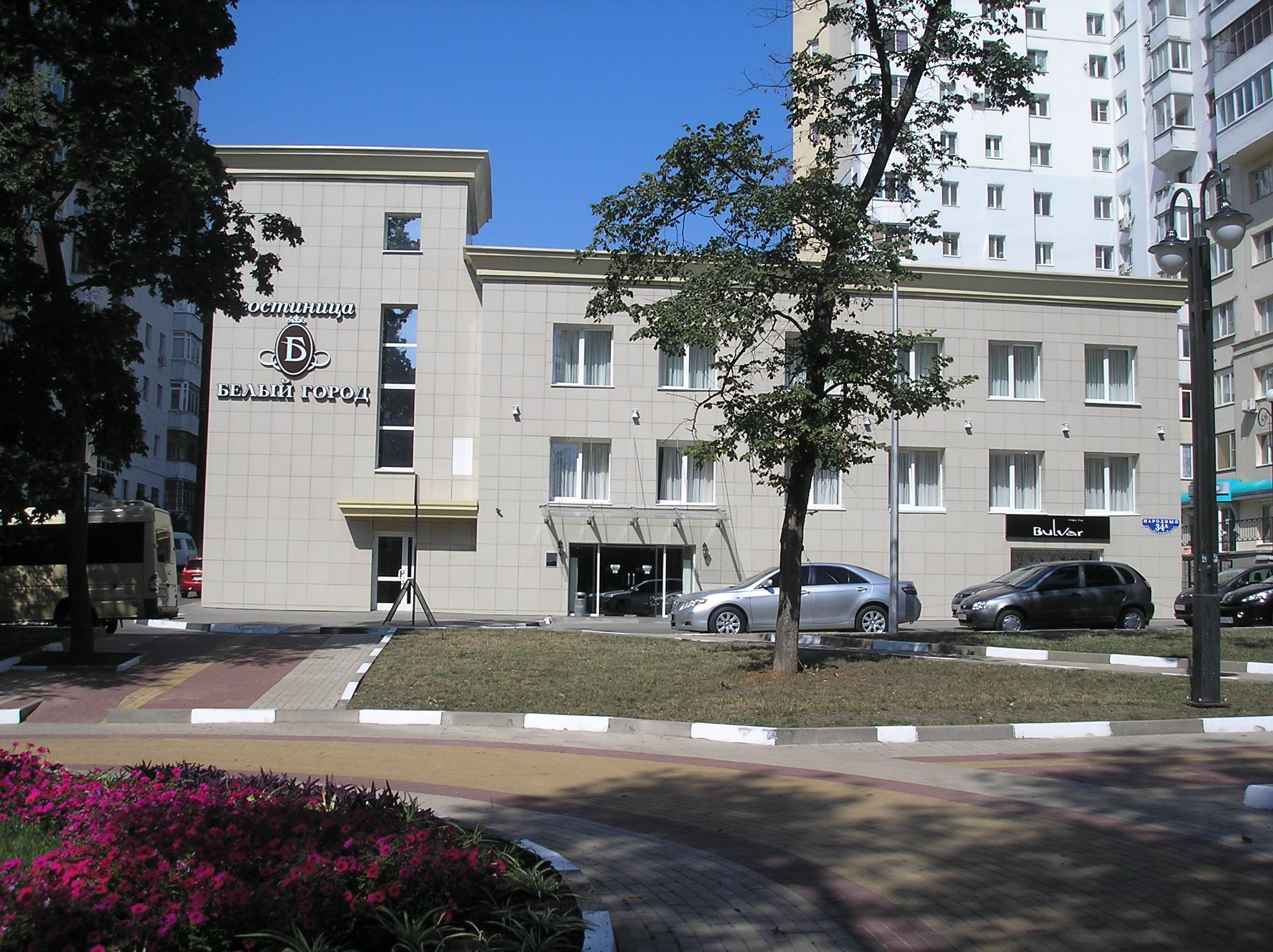 Гостиница Белый город на Народном бульваре